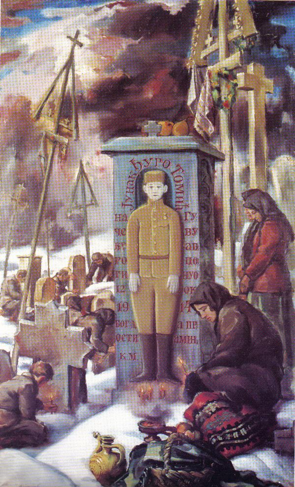 Михаило Миловановић, Задушнице, уље на платну 1935-1938.